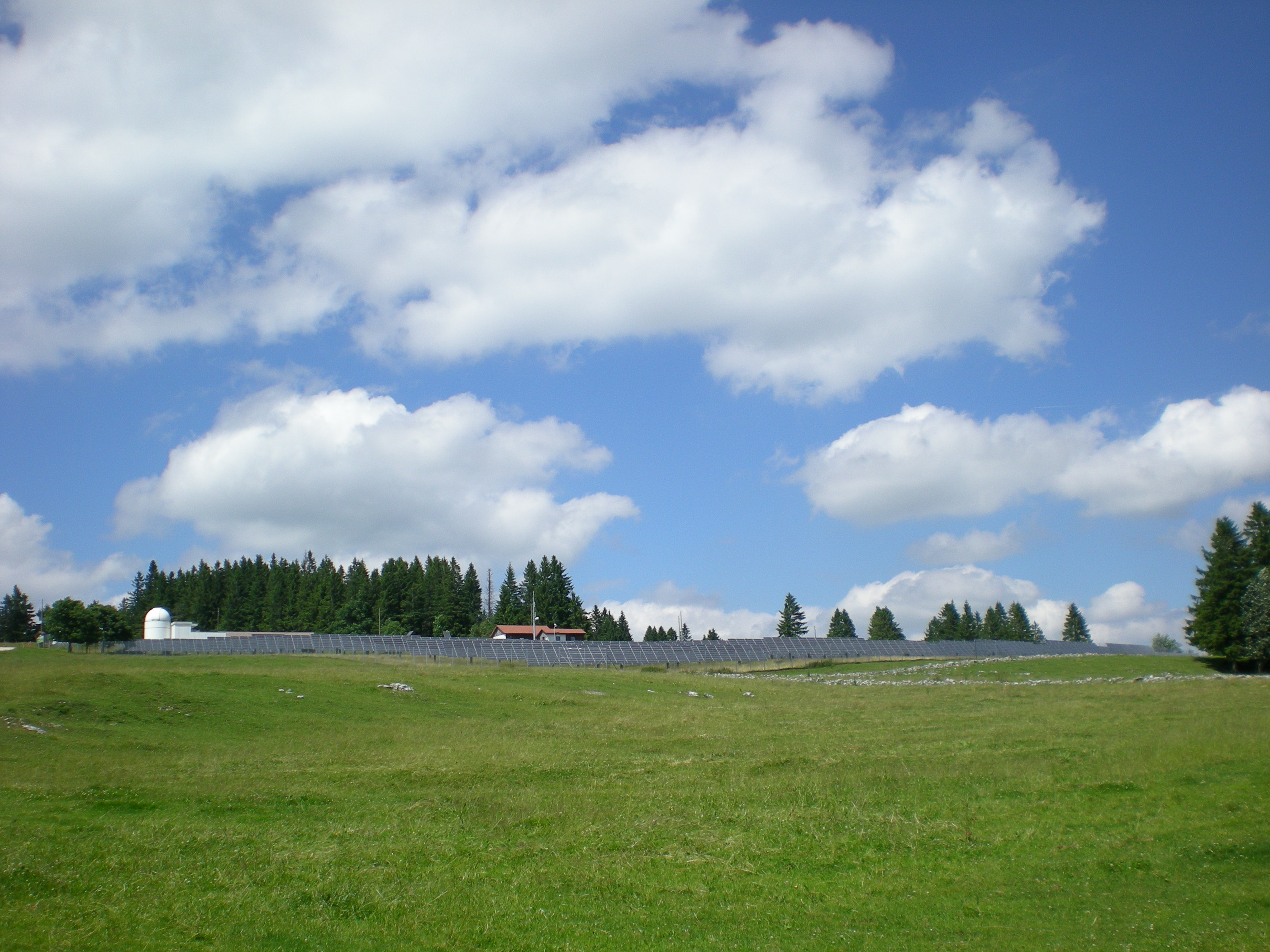 Mont Soleil, Solaranlage